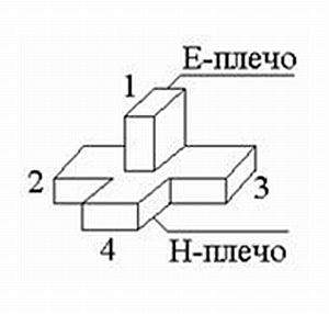 Т мост